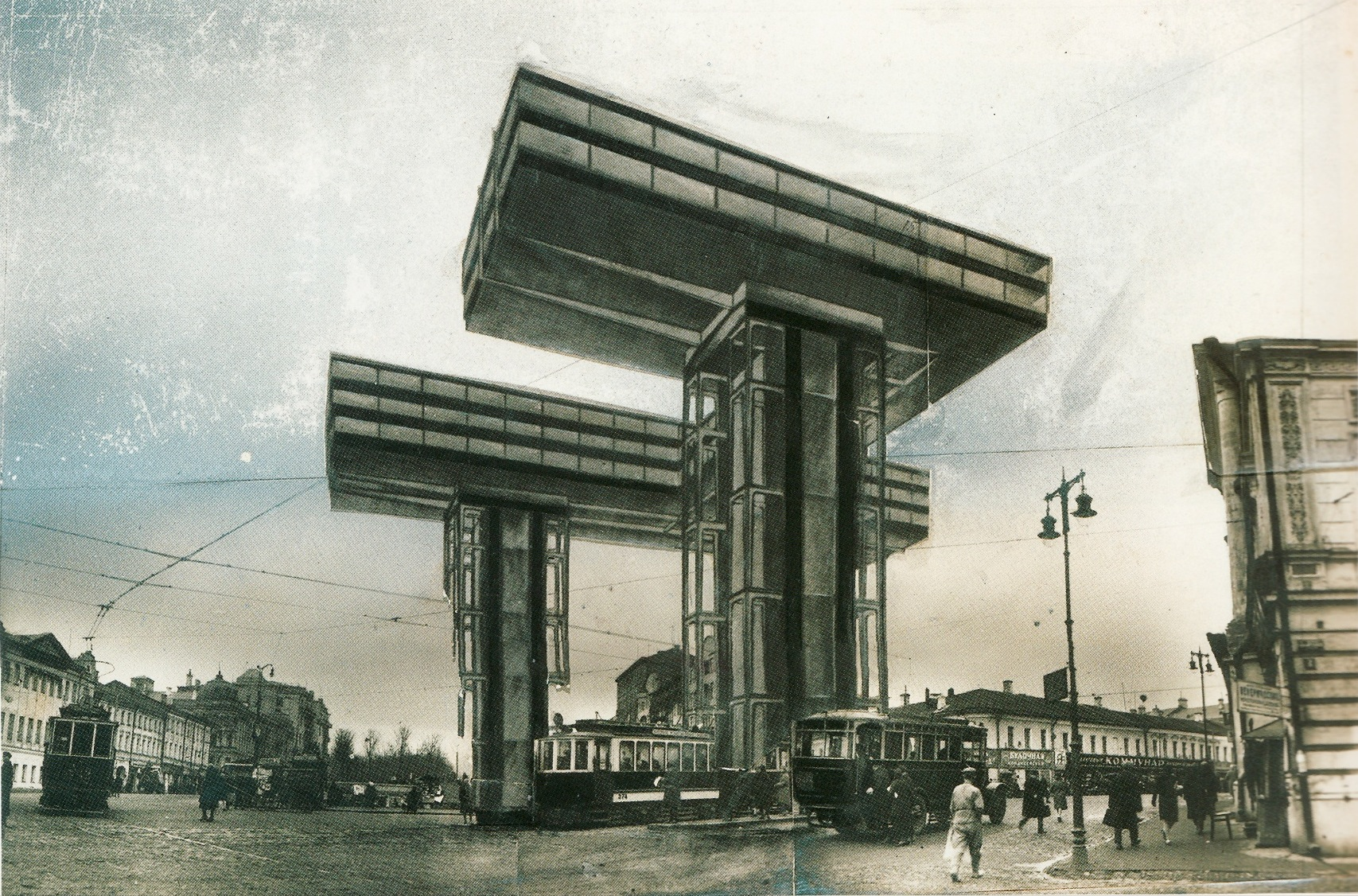 Л. Лисицкий. Проект горизонтальных небоскрёбов в Москве